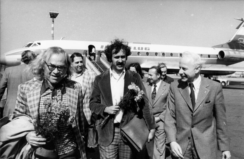 Sobell, Perlin, Meeropol, Loeser ADB-ZB Mittelstädt, 19.4.1976 Berlin: Robert Meeropol-Rosenberg zu DDR-Besuch eingetroffen Robert Meeropol (2 v.r.), der Sohn des vom USA-Imperialismus ermordeten Ehepaars Ethel und Julius Rosenberg, ist am 19.4.1976 in Berlin eingetroffen. Robert Meeropol, der auf Einladung des Friedensrates der DDR und des Paul-Robeson-Komitees zu einem mehrtägigen Besuch in der DDR weilt, wird von dem mitverurteilten im Rosenberg-Prozeß Morten Sobell (l.) und dem Rechtsanwalt der Rosenberg-Sohne, Marshal Perlin (2 v.l., dahinter) begleitet. Auf dem Flughafen Berlin-Schönefeld wurden die Gäste vom Vorsitzenden des Paul-Robeson-Komitees, Prof. Dr. Franz Loeser (r.), sowie dem Generalsekretär des DDR-Friedensrates, Werner Rümpel, herzlich willkommen geheißen. [Berlin-Schönefeld.- Morten Sobell, Marshal Perlin, Robert Meeropol, Franz Loeser (vlnr) vor Flugzeug Tupolew Tu-134 der Fluggesellschaft "Interflug"] Abgebildete Personen: Loeser, Franz Prof. Dr.: Friedensrat, Vorsitzender des Paul-Robeson-Komitees, DDR